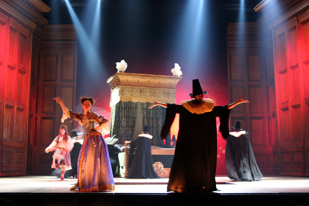 Le Roi Soleil, Musical show in Paris (Palais des Sports), France